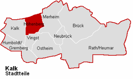 Lagekarte Höhenberg im Stadtbezirk Köln-Kalk